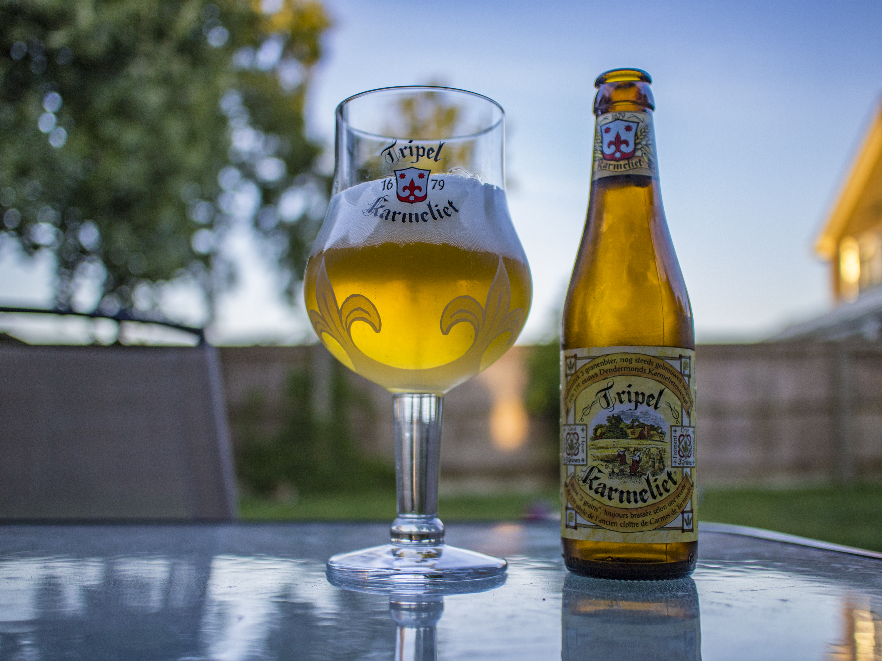 Belgian beer